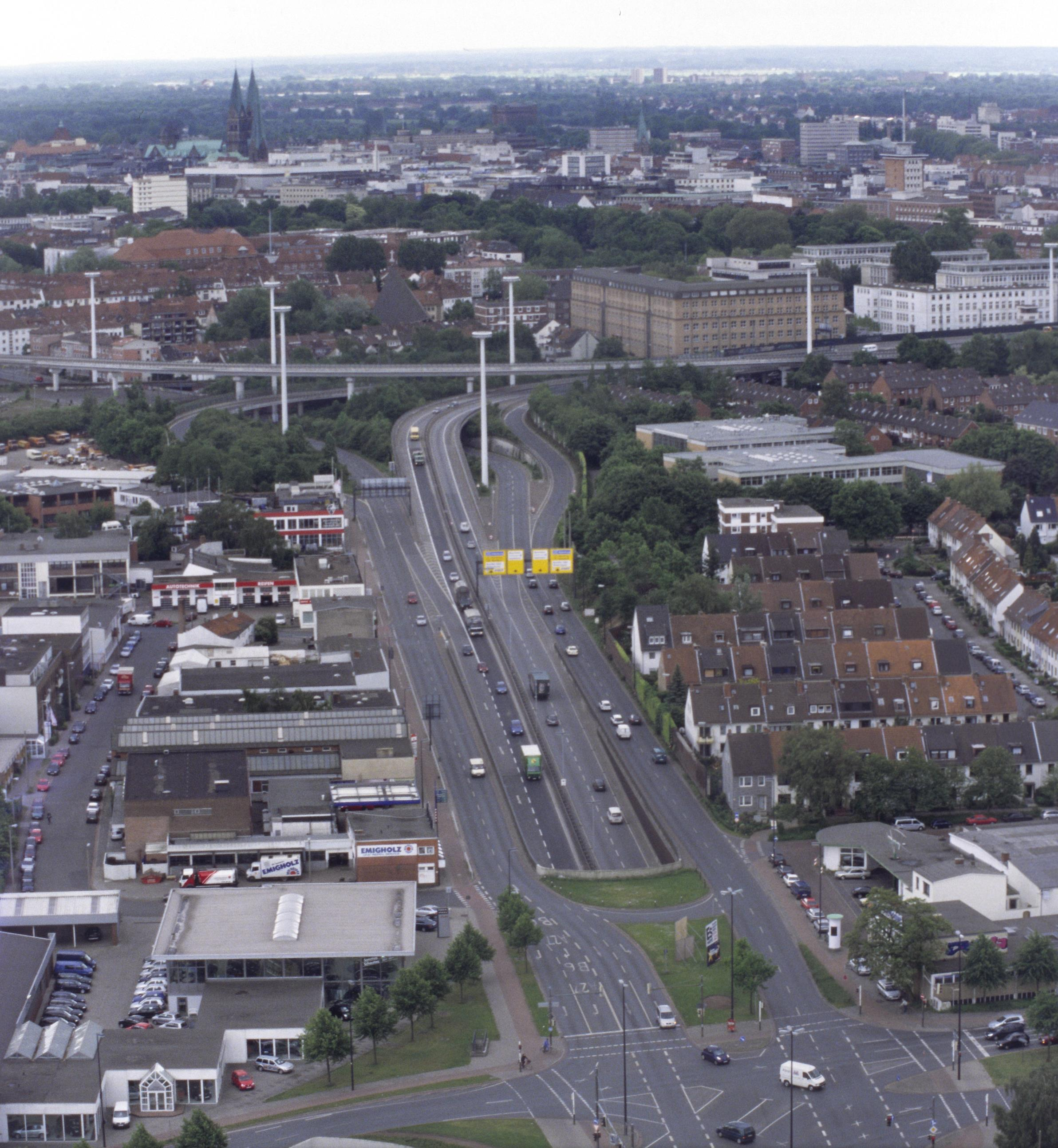 Blick vom Fernmeldeturm Bremen Richtung Hauptbahnhof mit Utbremer Heerstraße, der Ein-/Ausfahrt des Straßentunnels zum/vom Utbremer Kreisel und dem Flyover vom Breitenweg in Richtung Stephanibrücke